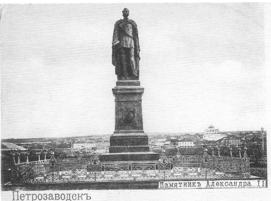 Памятник Александру II в Петрозаводске. Установлен в 1885 году. Скульптор Иван Шредер. Статуя была отлита из бронзы на заводе Адольфа Моранда в Санкт-Петербурге, пьедестал изготовлен из тивдийского мрамора тёмно-зелёного цвета по проекту академика архитектуры Антоний Томишко. Высота памятника 8,5 м. Император изображён в генеральском мундире с непокрытой головой, в порфире с цепью Ордена святого Андрея Первозванного. В правой руке императора — свиток с надписью «19 февраля 1861 года». На пьедестале выбита надпись — «Царю-освободителю — Олонецкое земство. 1881». Памятник был снесён в 1918 году и переплавлен.